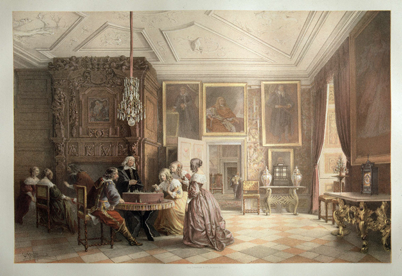 Salongsinteriör med shackspelande sällskap. Färgtryck.